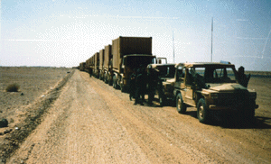 Convoi logistique lors de l'Opération Daguet, Arabie Saoudite, 1991